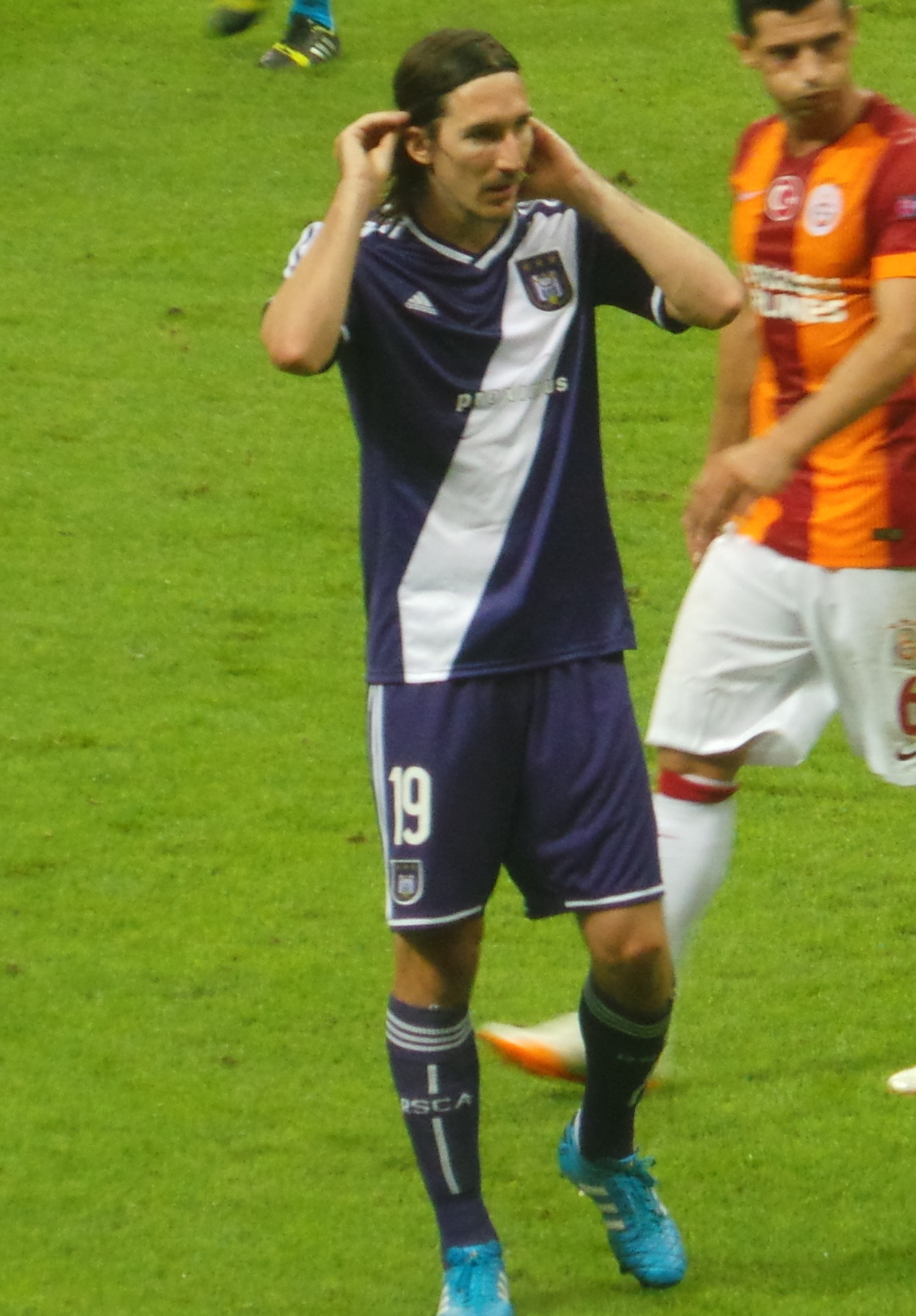 Sacha Kljestan